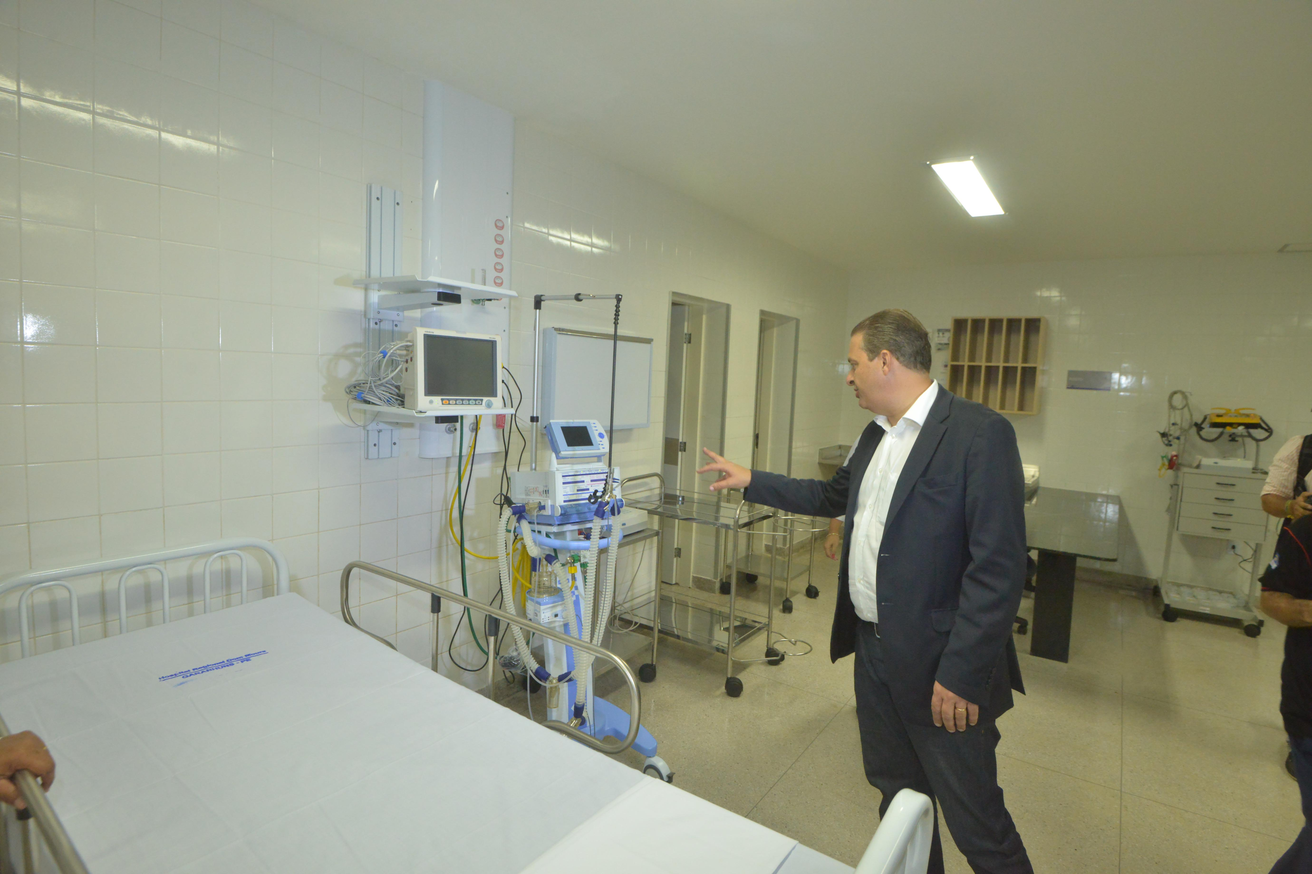 Governador Eduardo Campos inaugura reformas do Hospital Regional Dom Moura - Garanhuns, Pernambuco, Brasil